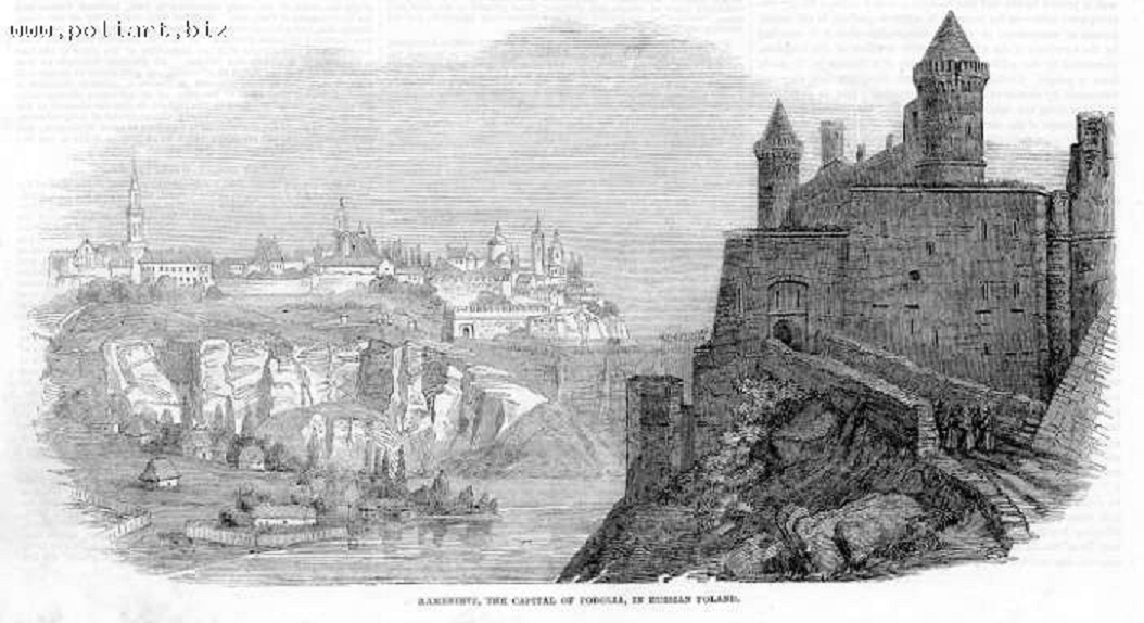 Замок Камянець Подільський, 1853.